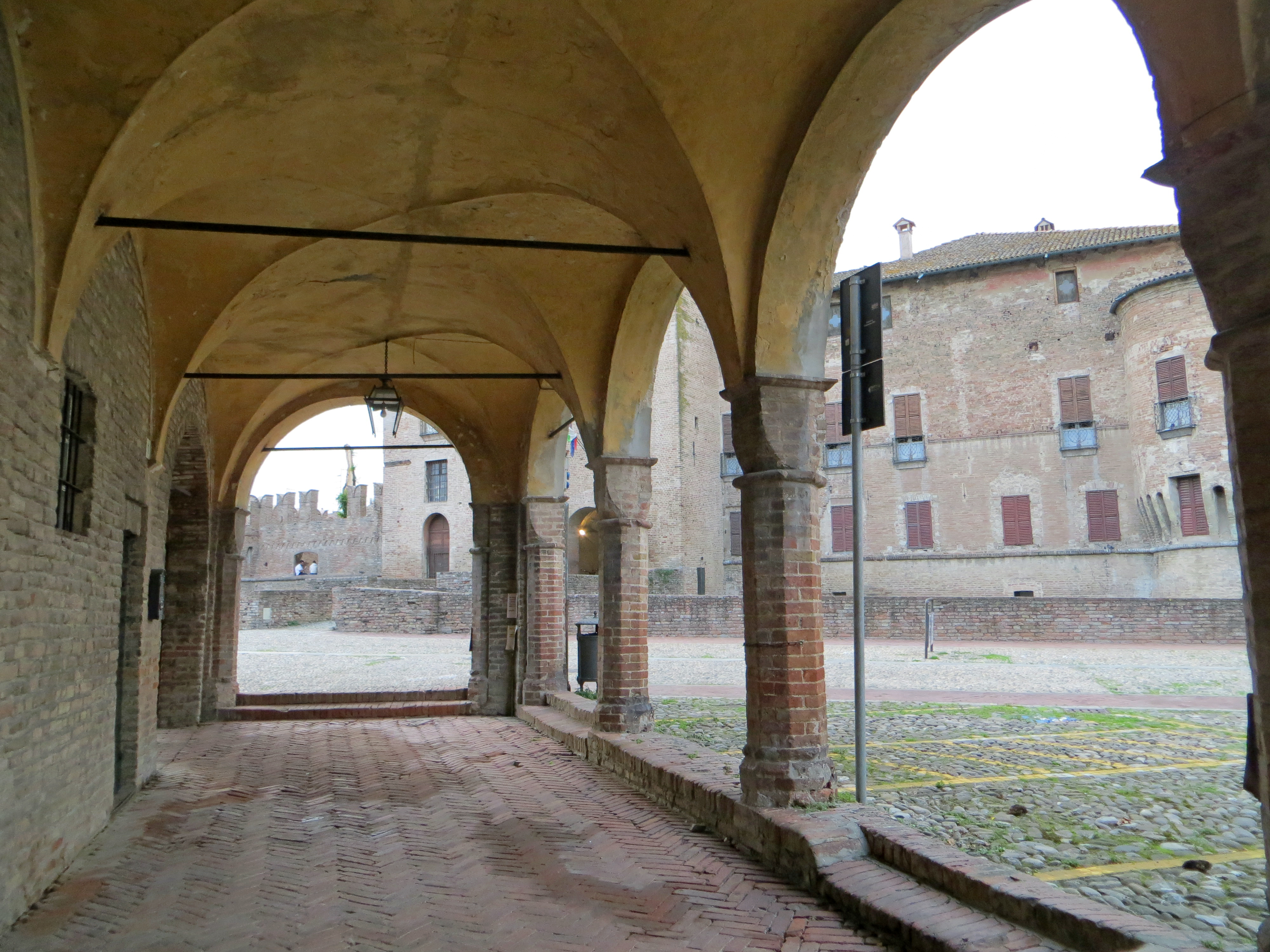 Scuderie Sanvitale (Fontanellato) - porticato